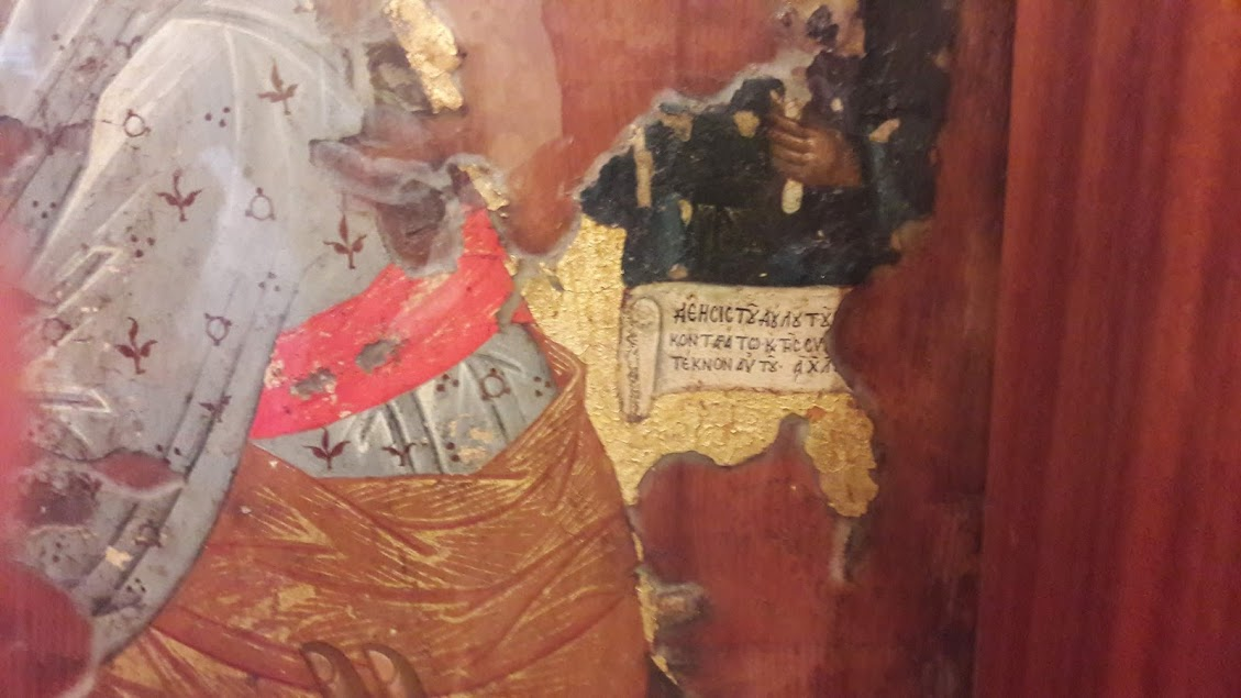 Η εικόνα φέρει χρονολογία της δεκαετίας του 1630 και είναι αφιέρωμα της οικογένειας Κονταράτου.